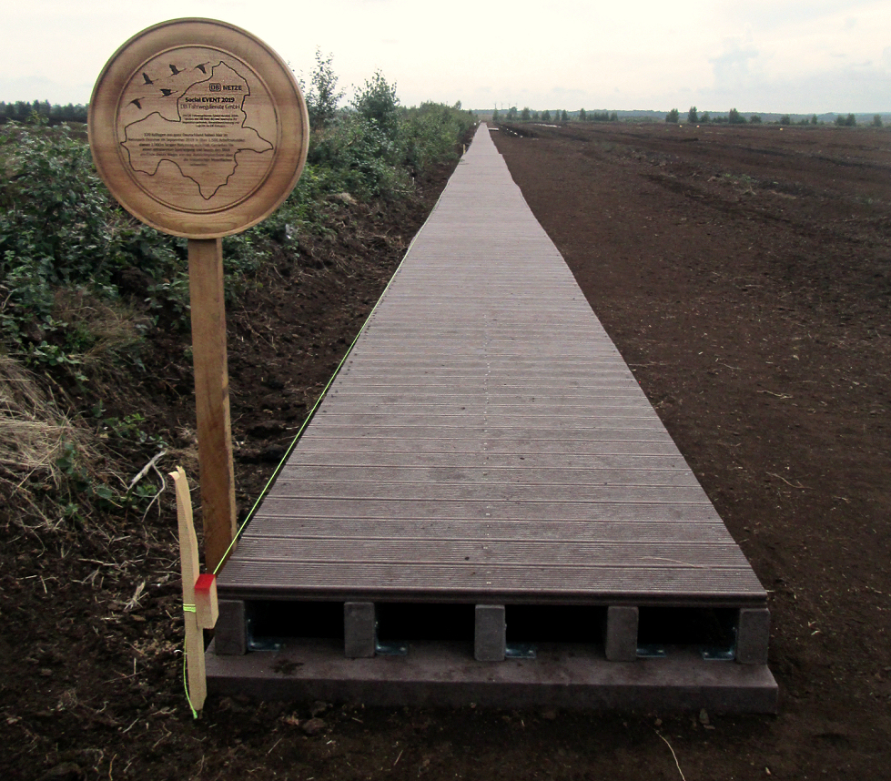 Entstehen der Moorloipe als Holzsteg parallel zum historischen Moorweg im Aschener Moor